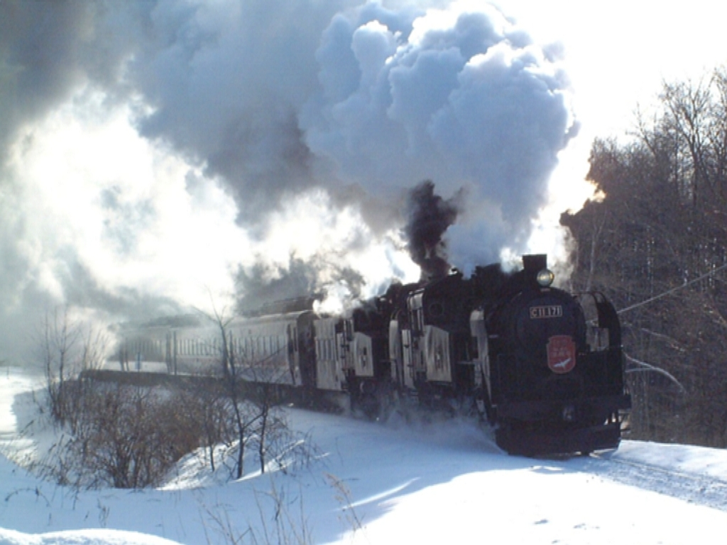 JR北海道の釧網本線で運転された、C11形機関車重連の『SL冬の湿原号』。